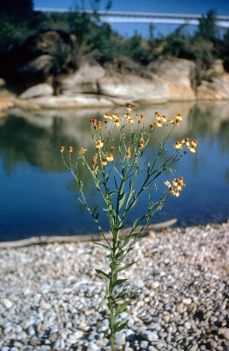 Helenium elegans var. amphilobium, pretty sneezeweed